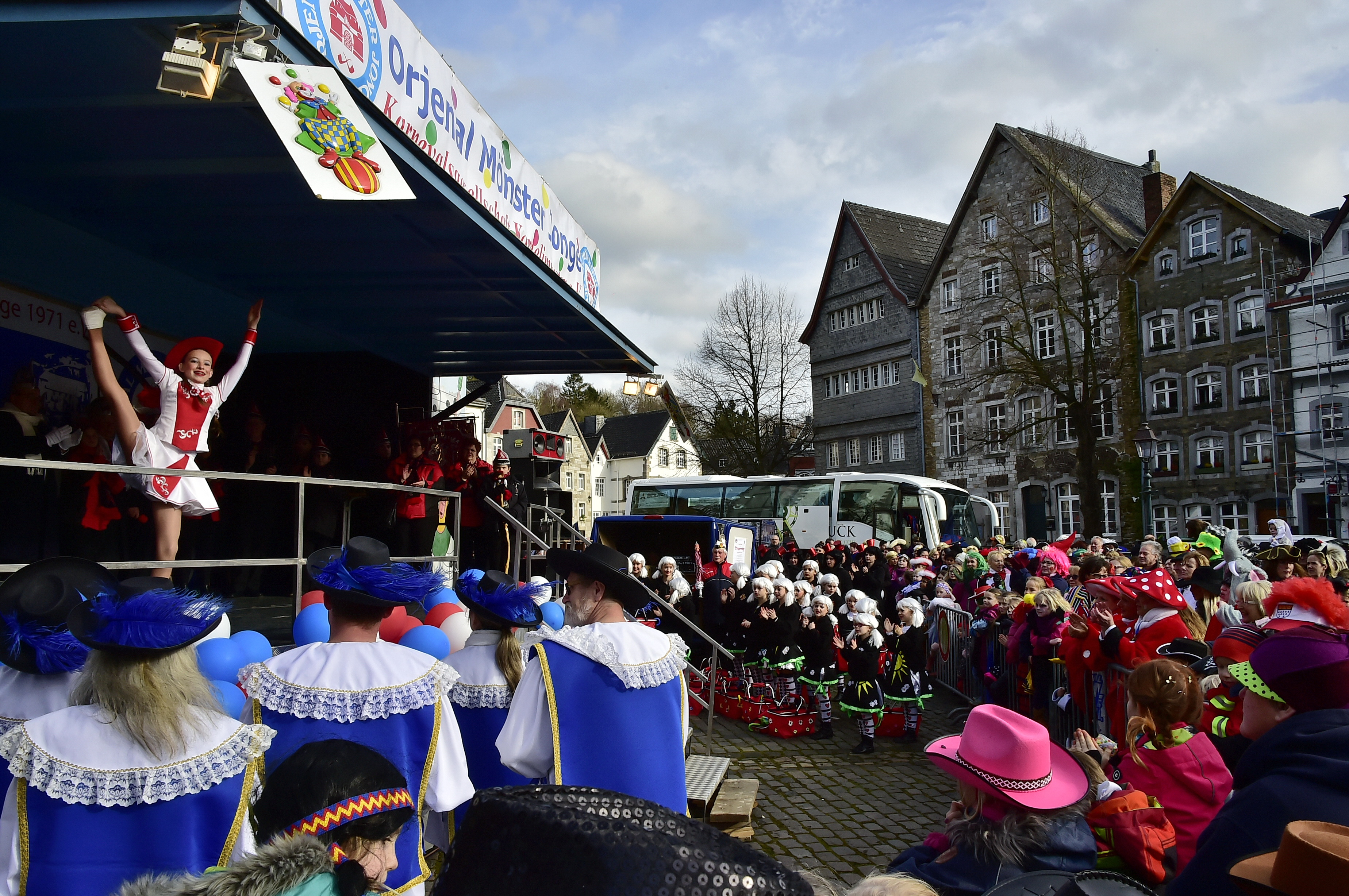 Marktsitzung der KG Orjenal Mönster Jonge in Kornelimünster 2016